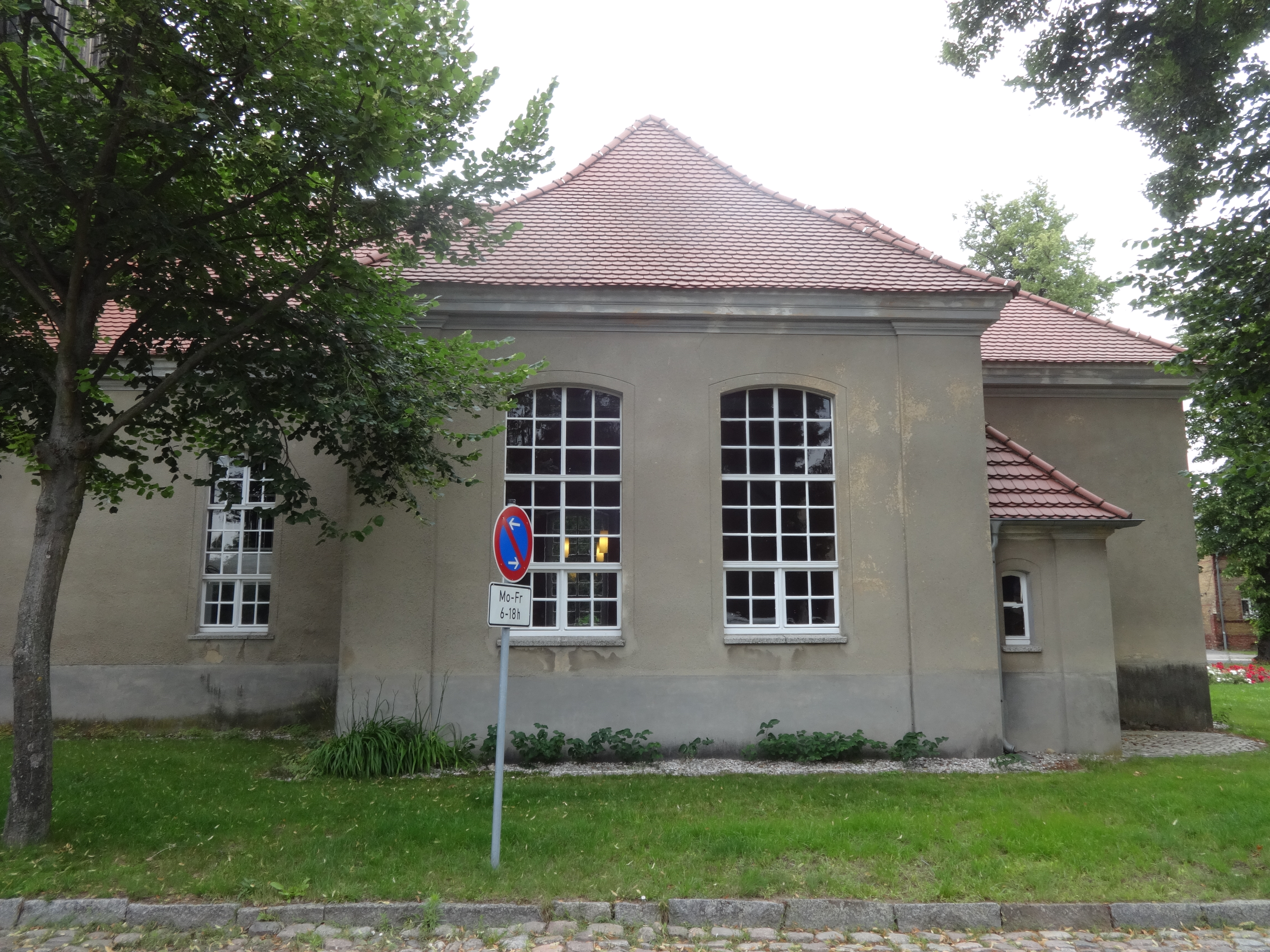 Die Dorfkirche in Groß Schulzendorf ist eine barocke Saalkirche, die vermutlich im Jahr 1744 errichtet wurde. 1896 erweiterte die Kirchengemeinde das Bauwerk um ein Querhaus und ein Chorquadrat. Die Kirchenausstattung ist modern. Das Bauwerk steht in der Stadt Ludwigsfelde im Landkreis Teltow-Fläming in Brandenburg.